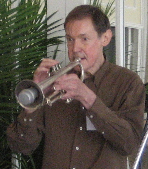 Trumpeter Peter Ecklund at Satchmo Summerfest, New Orleans